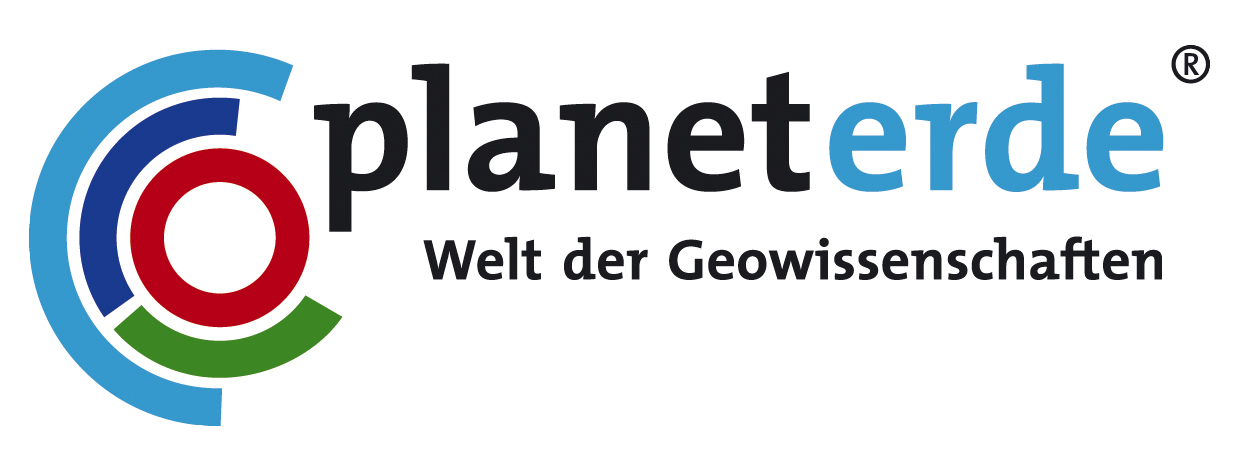 Logo "planeterde", welches vom Bundesministerium für Bildung und Forschung vergeben wird